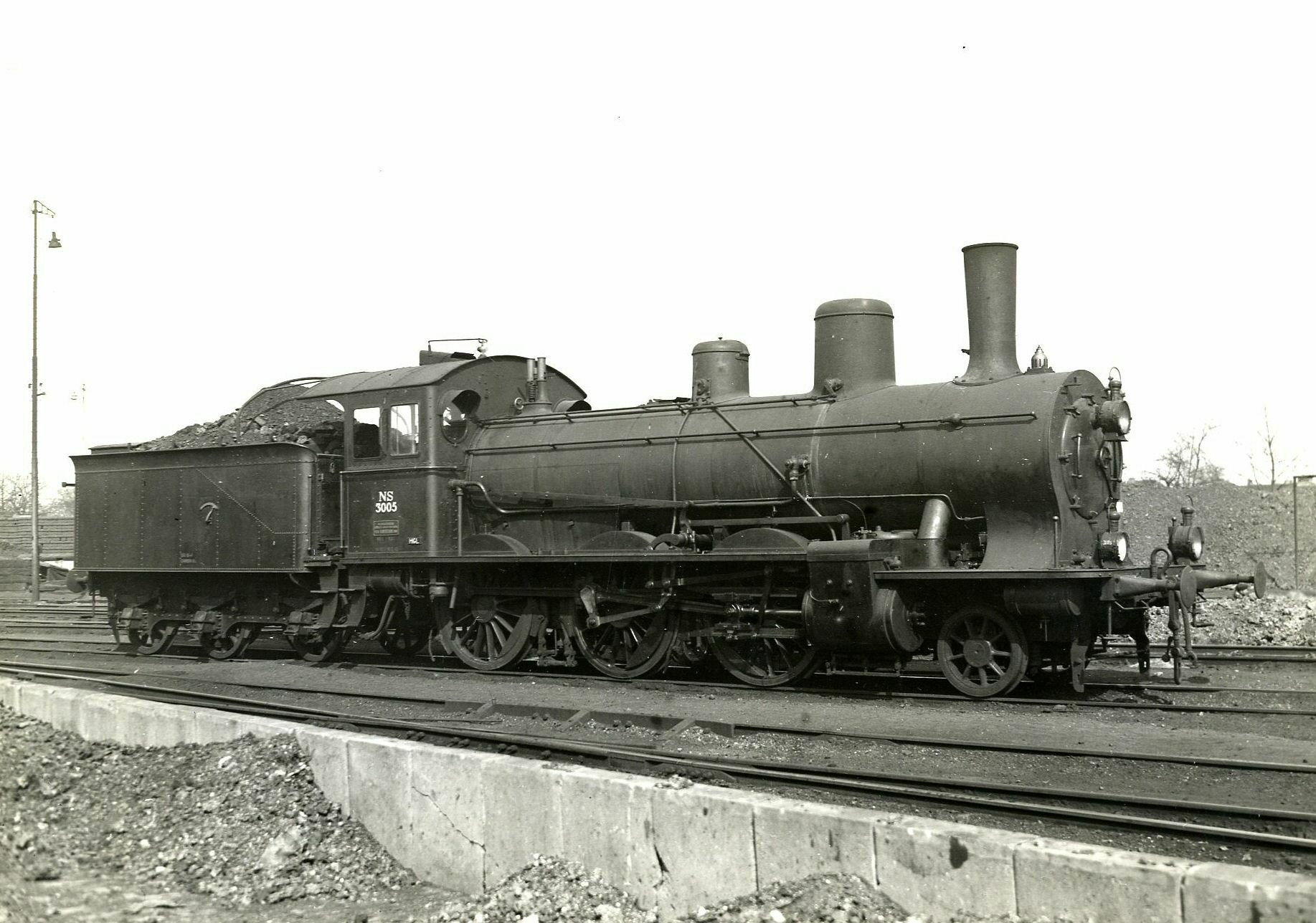 Afbeelding van de stoomlocomotief nr. 3005 (serie 3000) van de N.S., afkomstig van de S.B.B. te Hengelo